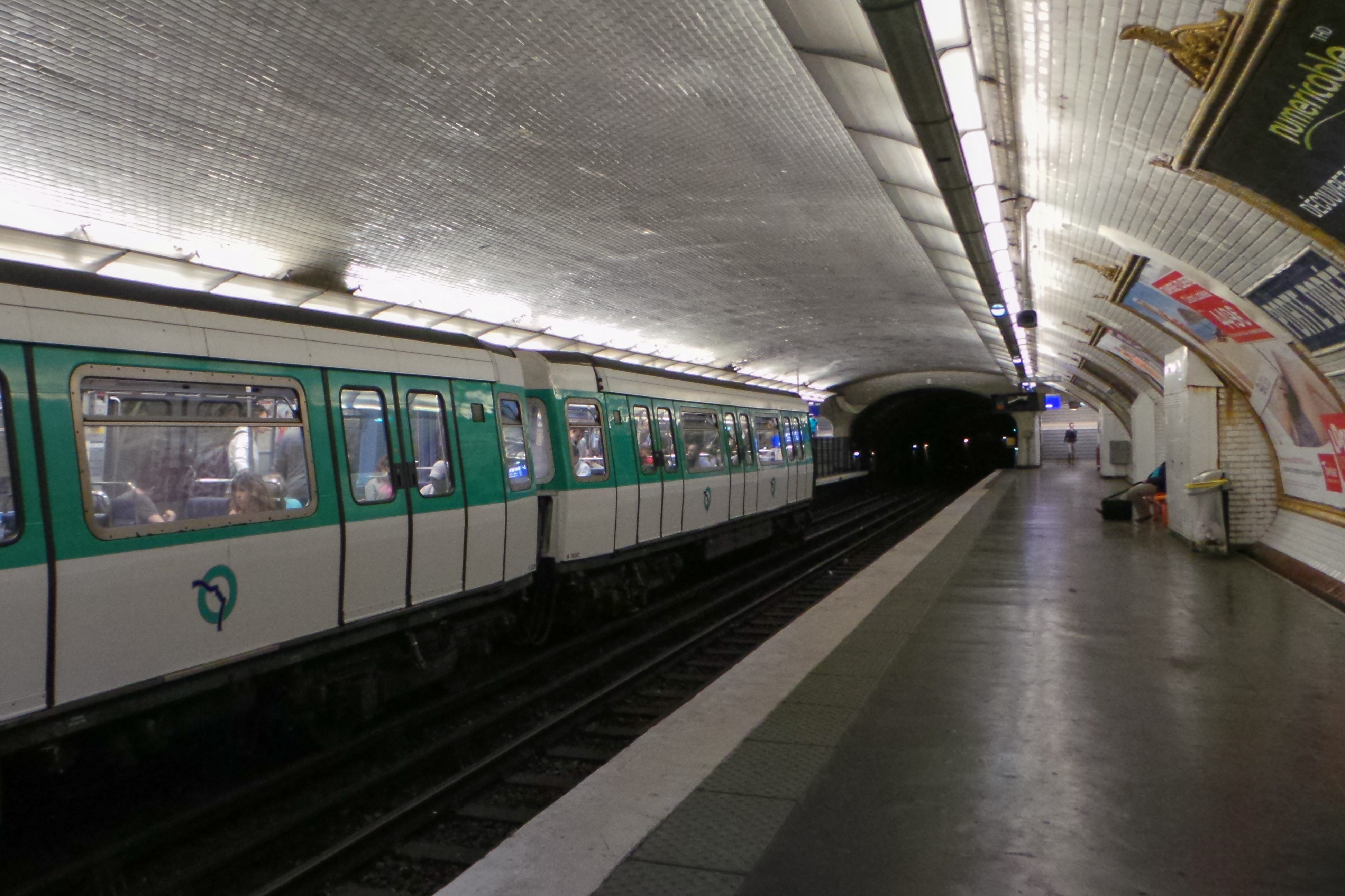 Station de métro Porte Dorée, ligne 8 du métro de Paris - Paris, France